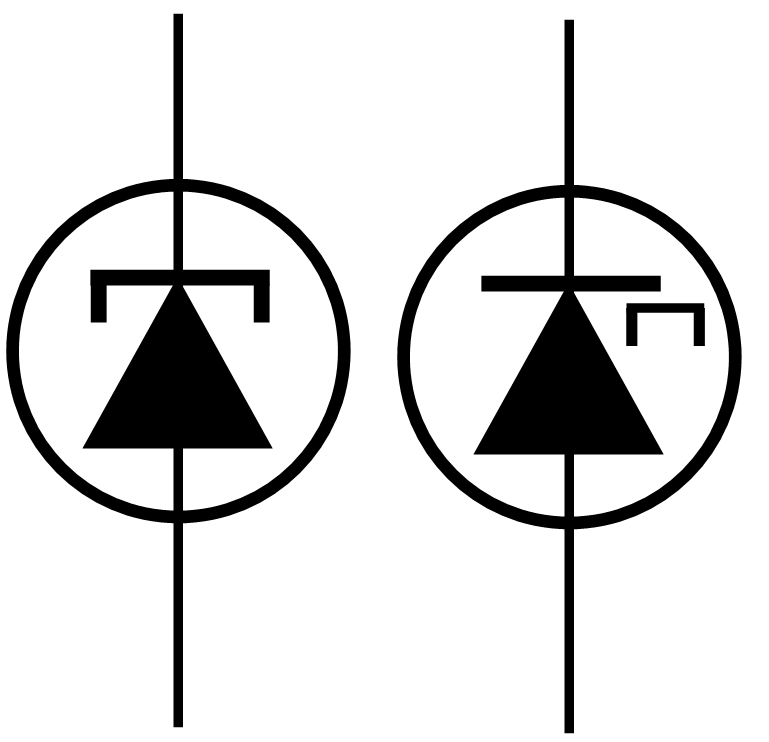 symbols of tunneldiode